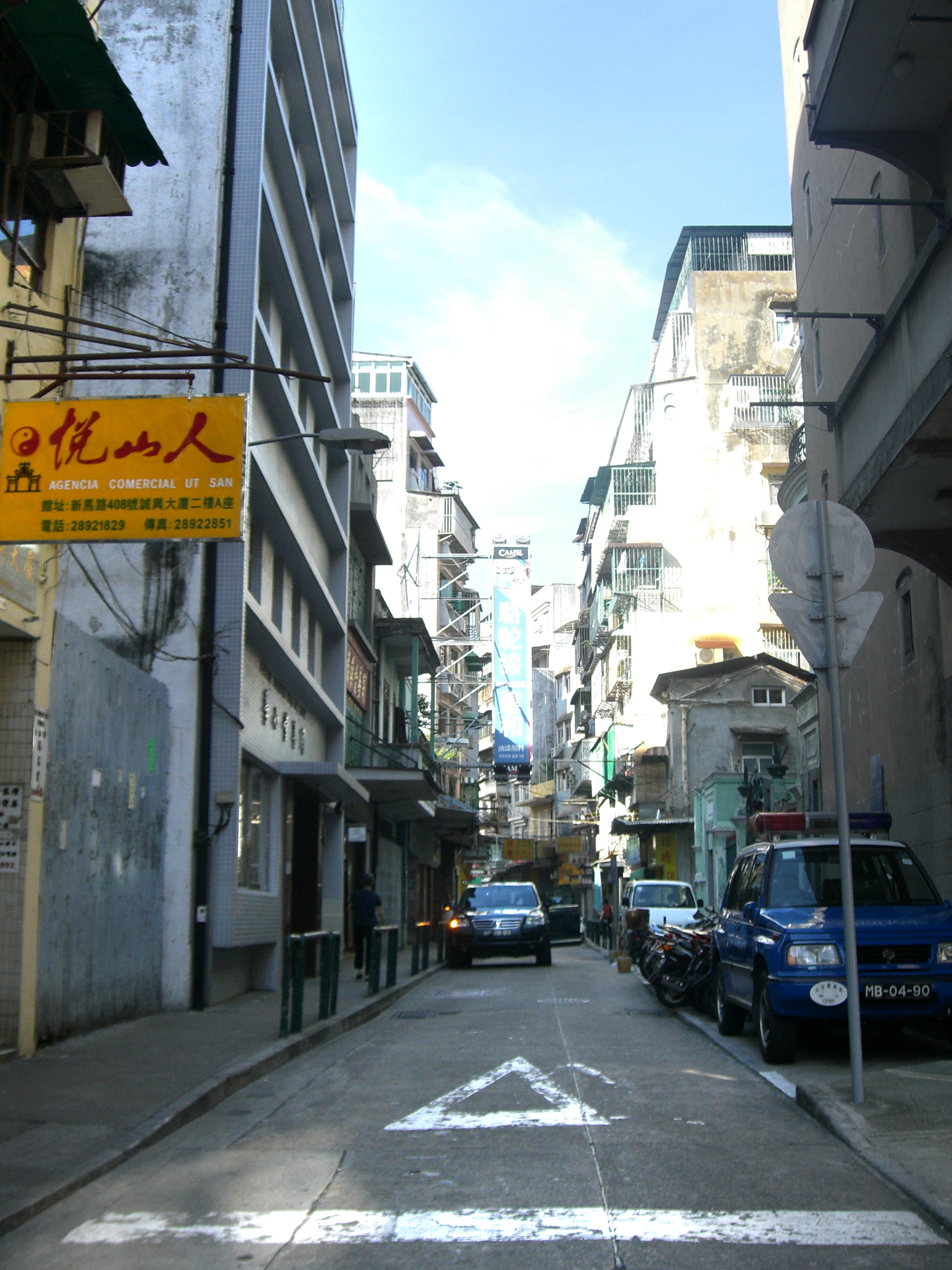 Rua De Camilo Pessanha in Macau